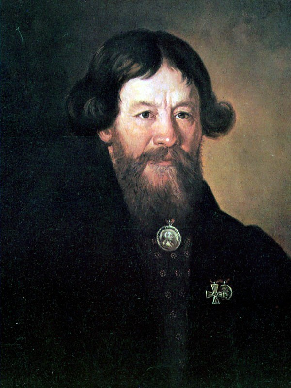 Портрет партизана Егора Стулова (1813 год)